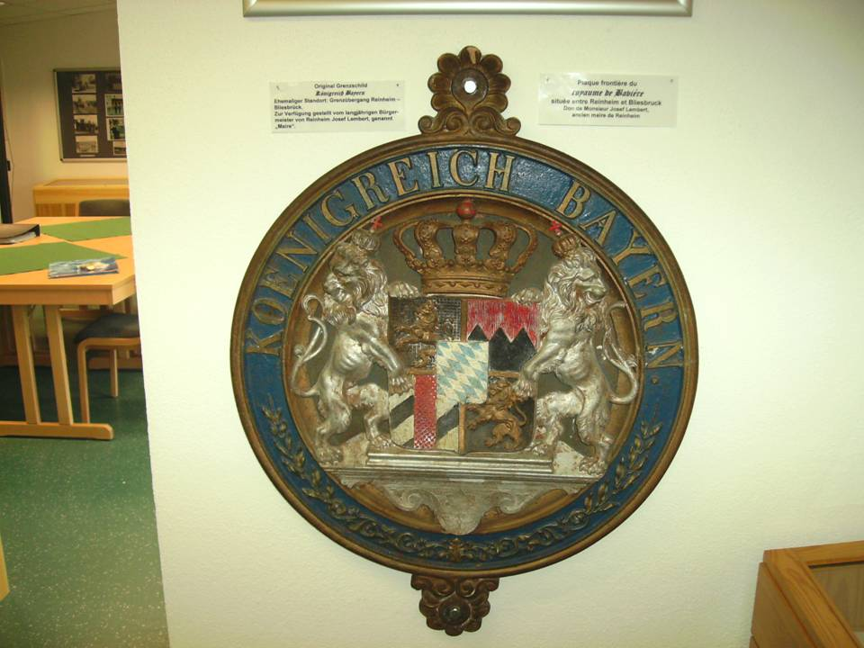 Zollmuseum Habkirchen: Origina-Grenzschild des Königreichs Bayern am Zollübergang Habkirchen - Frauenberg